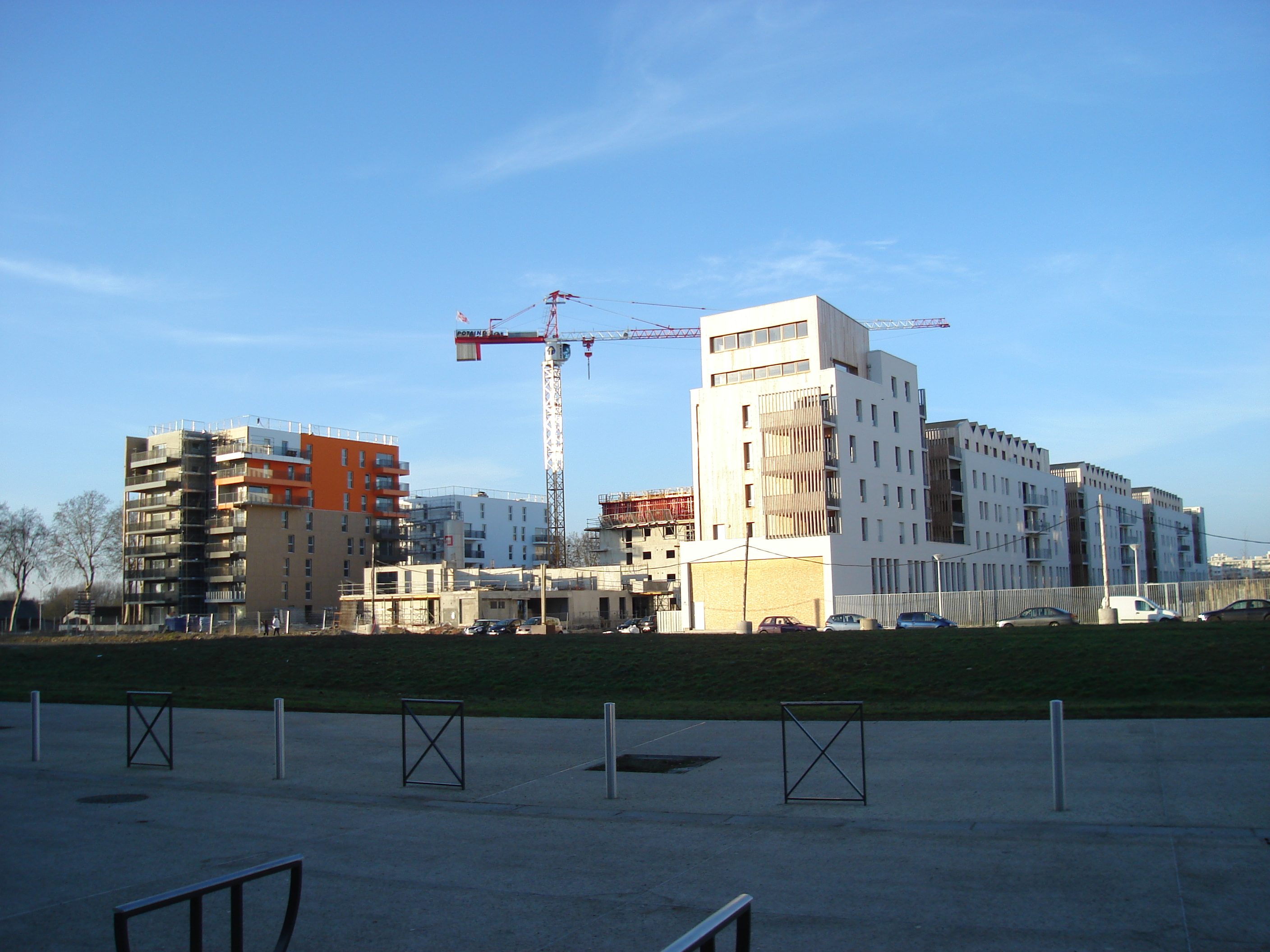 Vue de la résidence Maisons blanches (livrée en 2011, 200 logements), et la résidence Terrasses de la Gloriette en construction (livrée en 2011, 116 logements), dans le quartier des Deux-Lions, en février 2011